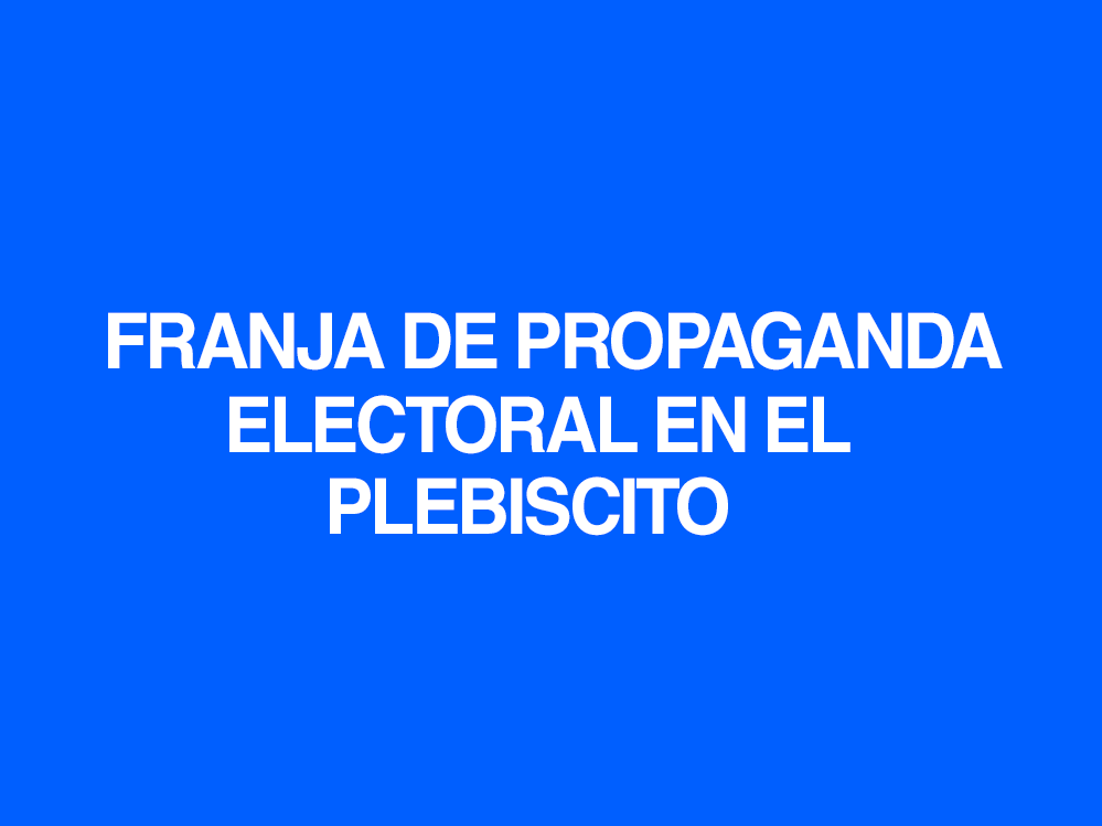 Placa exhibida al inicio de la franja de propaganda política emitida para el plebiscito nacional de Chile de 1988